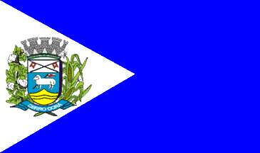 Bandeira de Cerro Corá, Rio Grande do Norte